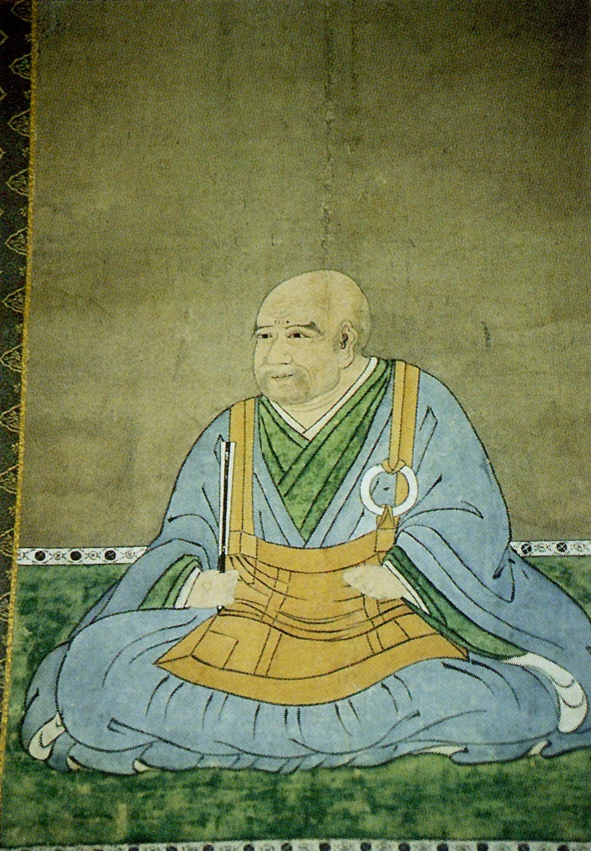 多久茂辰の肖像。